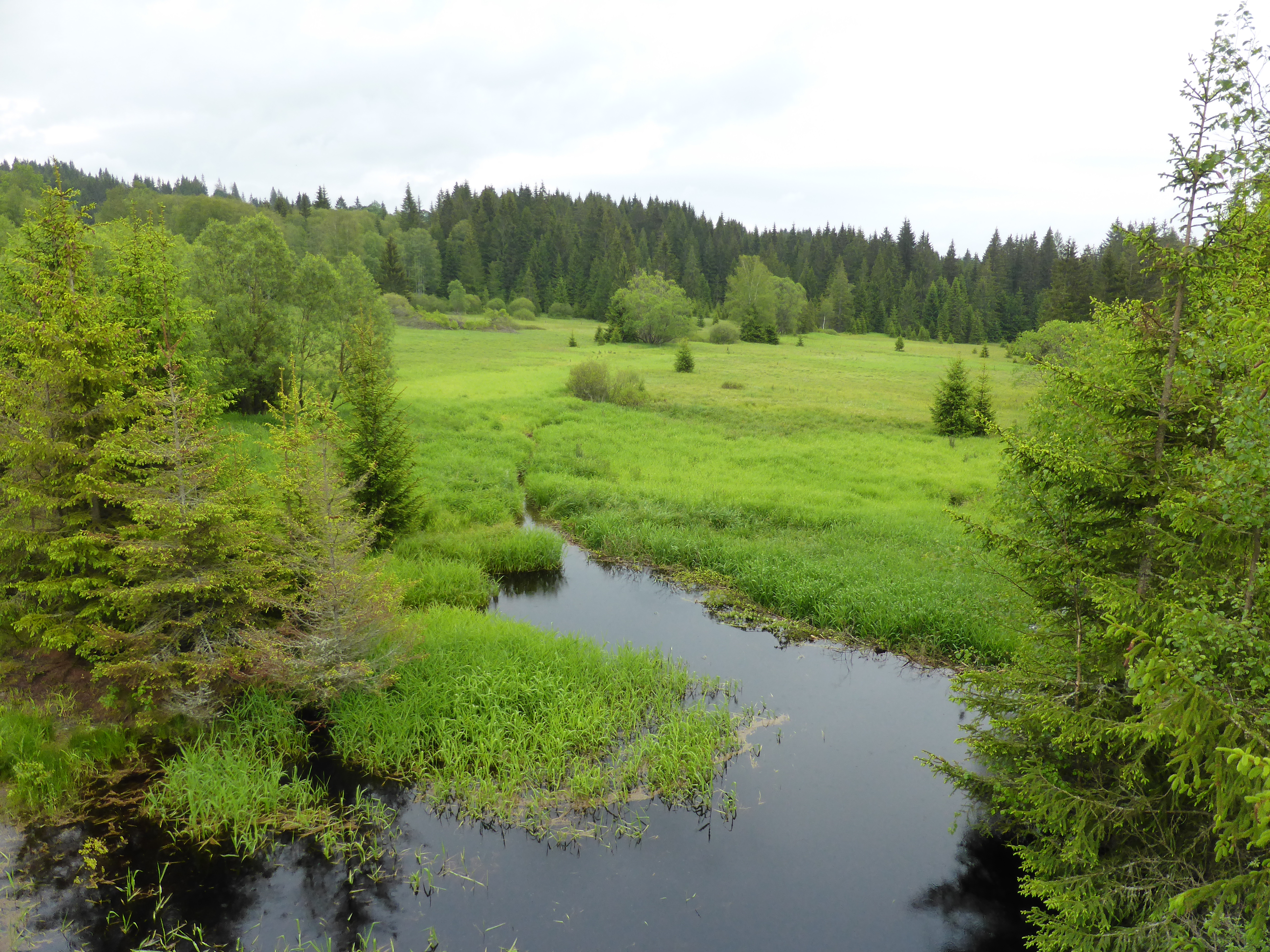 Das Naturschutzgebiet Zwicklfilz liegt zwischen der B 12 und der Grenze zu Tschechien im Landkreis Freyung-Grafenau. Das Gebiet umfasst 6,45 Hektar und wurde bereits 1939 ausgewiesen.